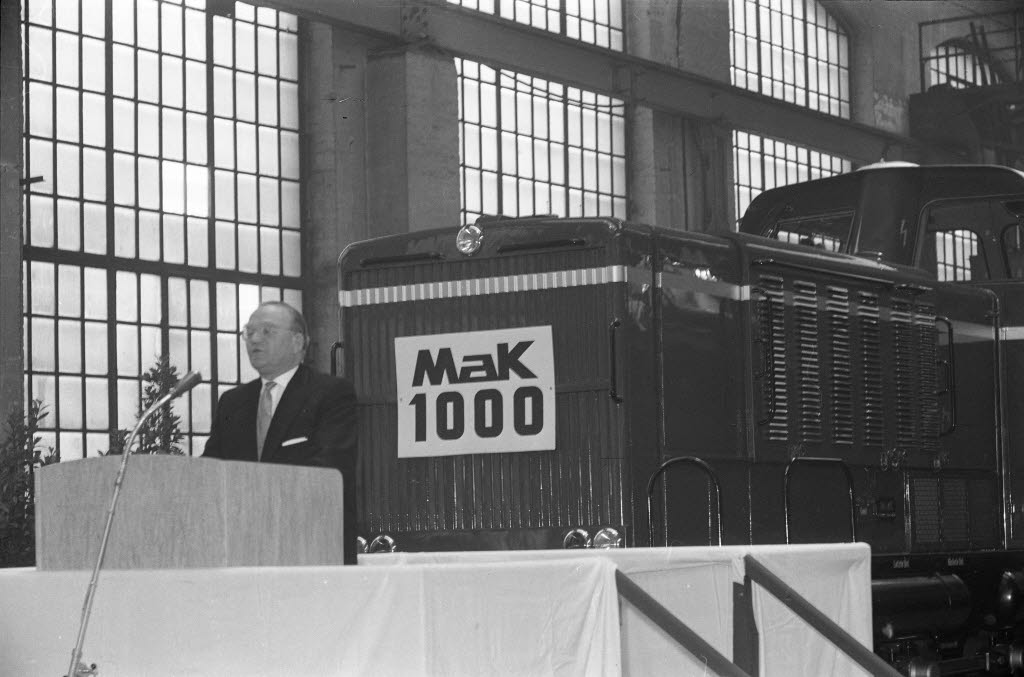 Auslieferung der 1000. und 1001. Diesellokomotive. Im Bild der Vorstandsvorsitzende der Osthannoverschen Eisenbahnen AG Dietrich Wersche am Rednerpult.